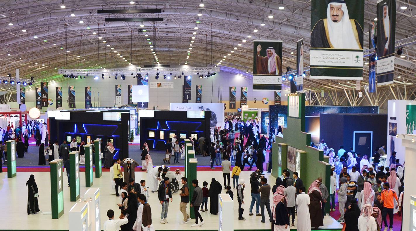 سياحة الاعمال في الرياض